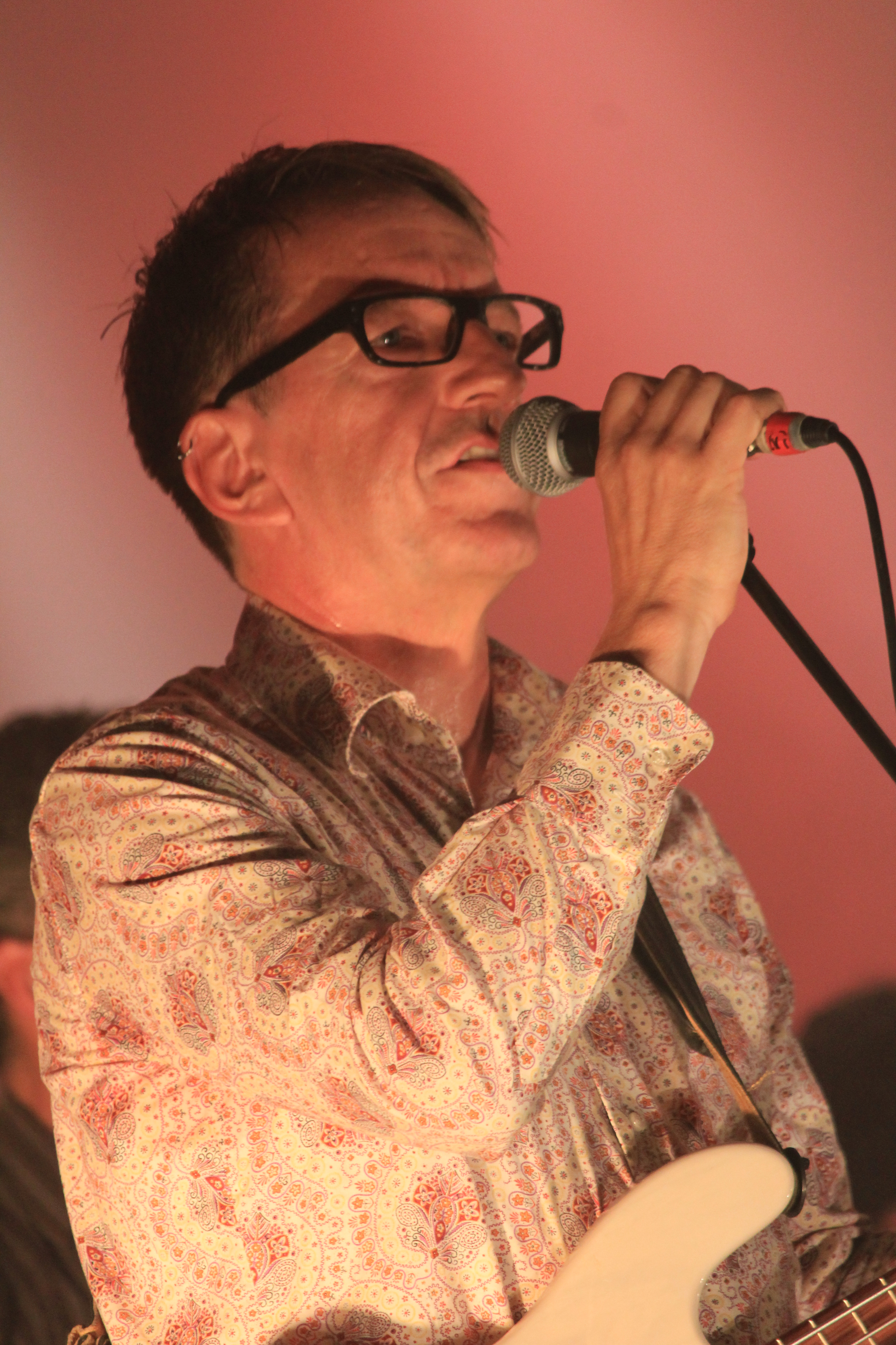 Ewen Vernal lors d'un concert de Capercaillie au festival interceltique de Lorient 2013